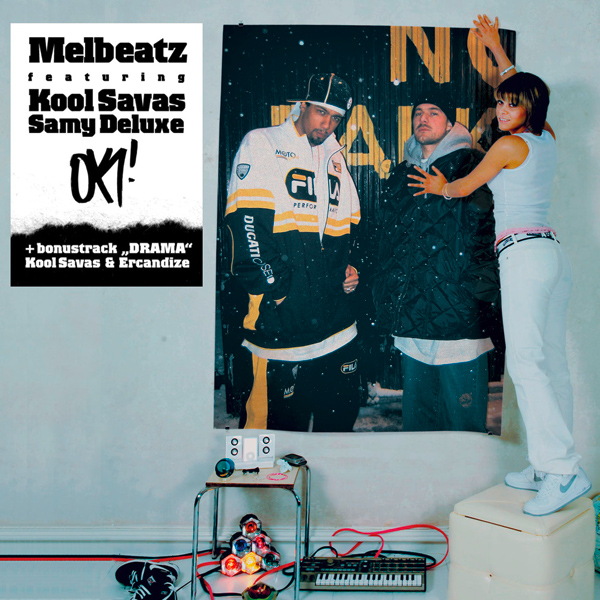 Cover der Single „OK!“